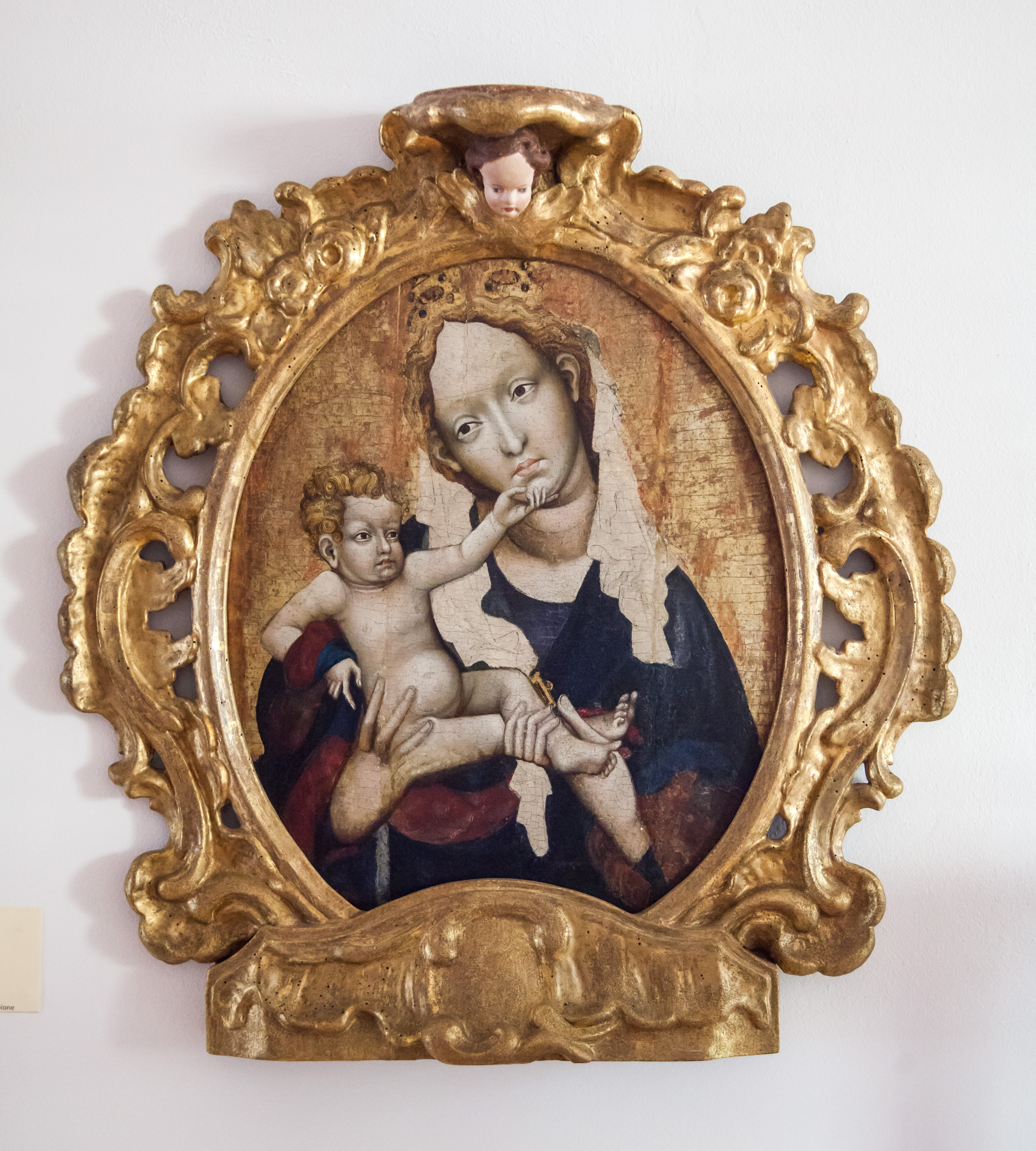 Madonna z Dzieciątkiem, obraz z ok. 1400 r. wykonany w Czechach, pochodzący z kościoła św. Jakuba w Toruniu. Obecnie w zbiorach Muzeum Diecezjalnego w Toruniu.